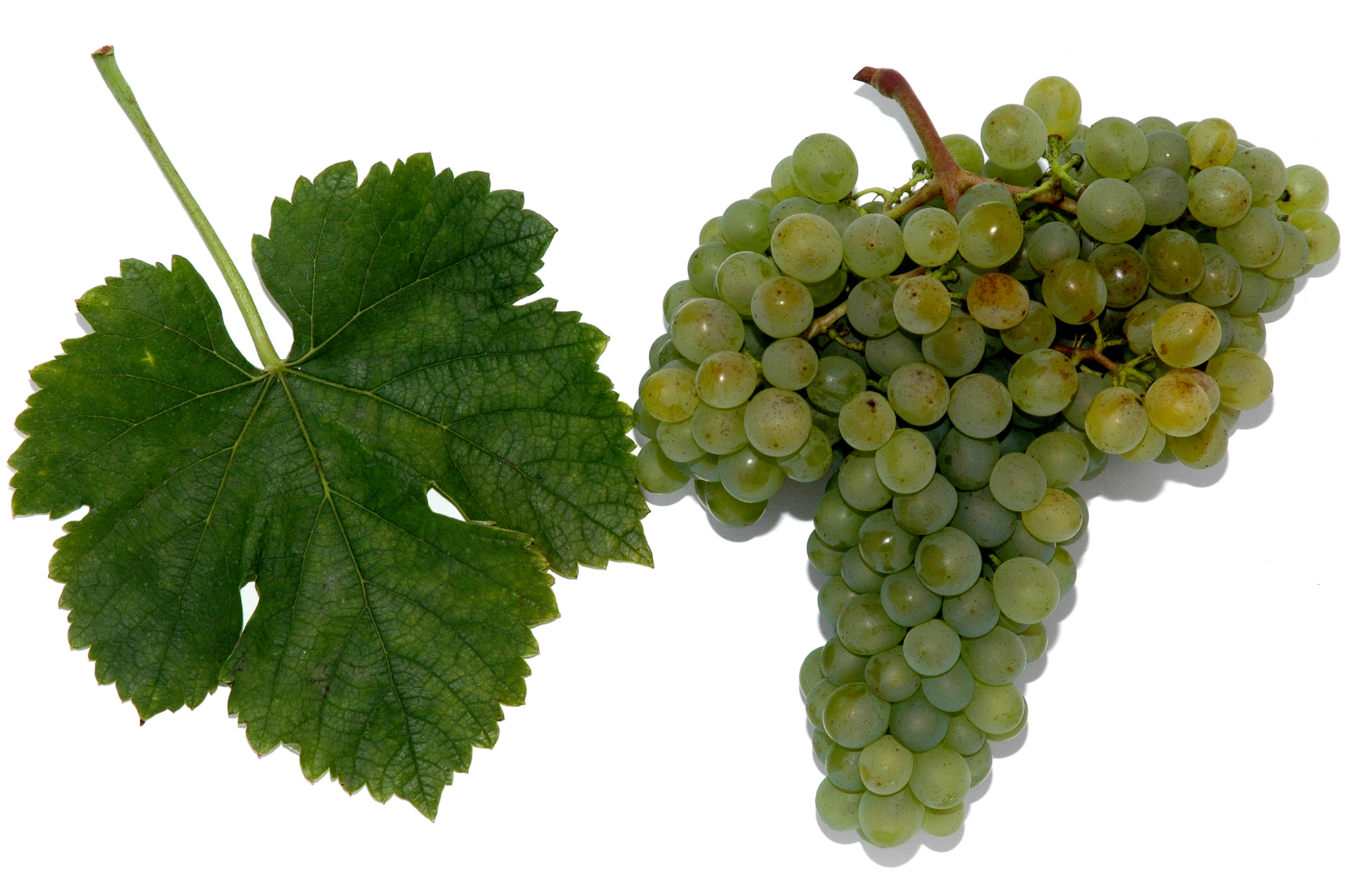 Blatt und Traube der Weißweinsorte 'Grüner Veltliner'.